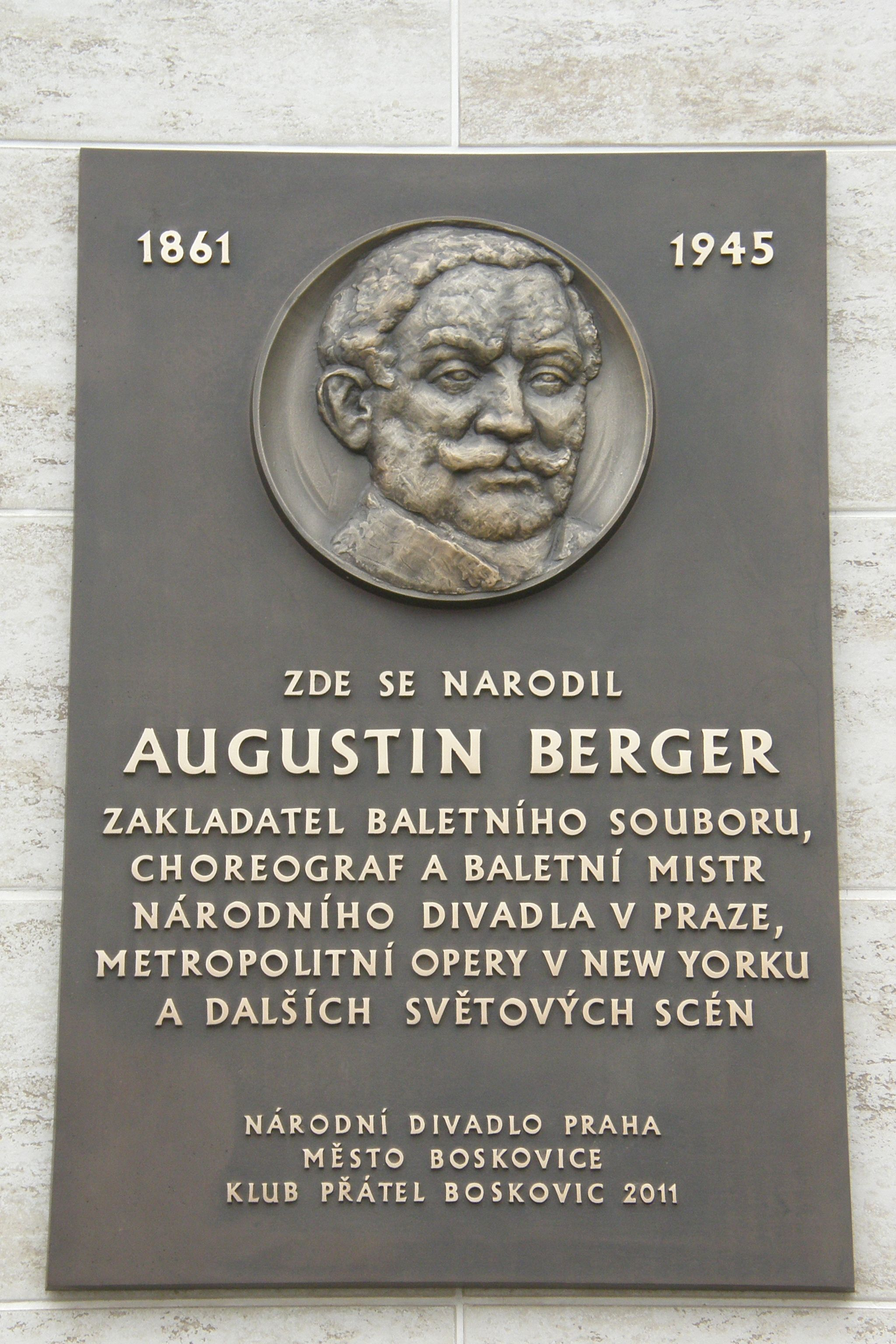 Pamětní deska Augustinu Bergerovi na Masarykově náměstí v Boskovicích